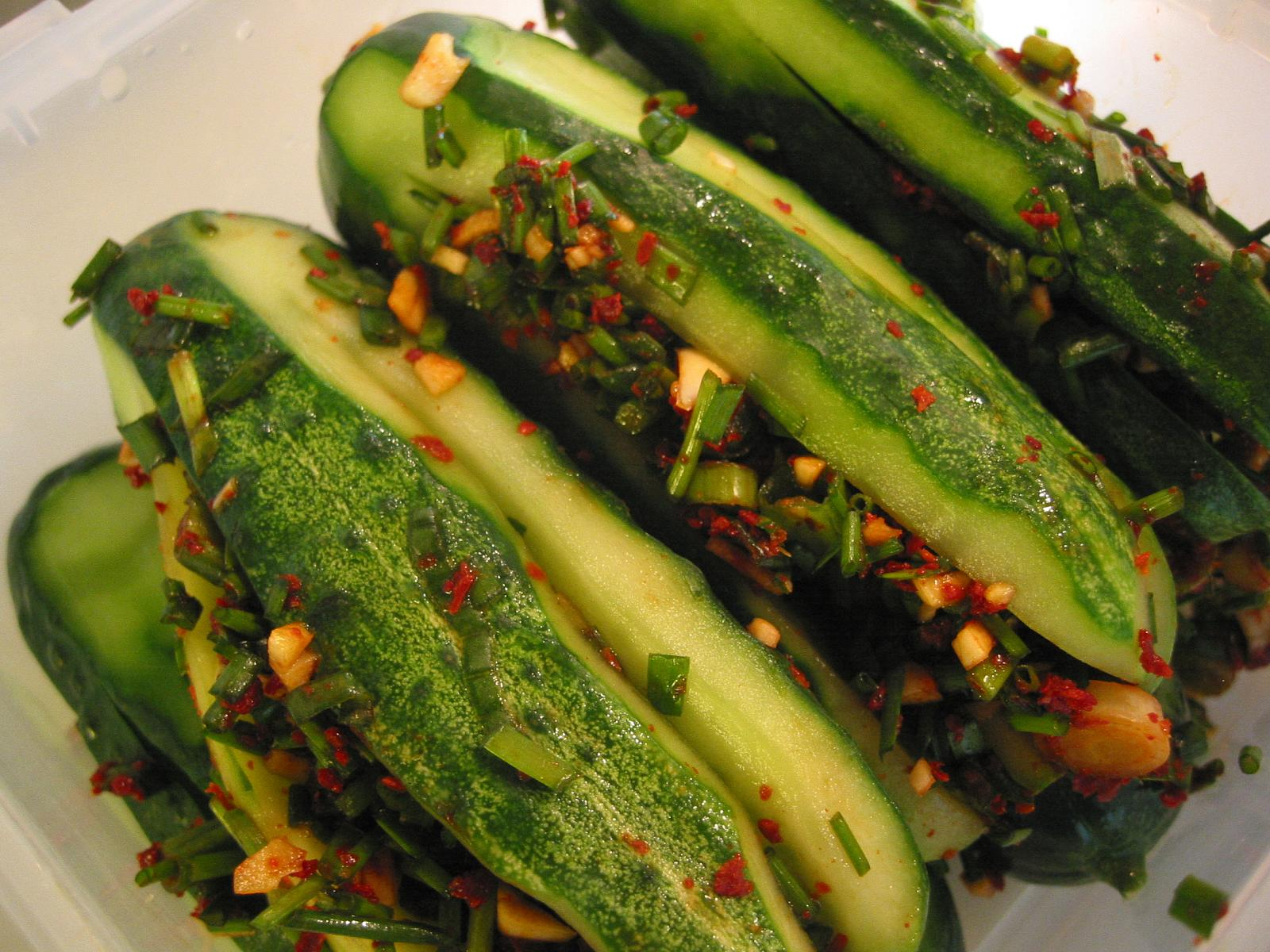 Oi kimchi